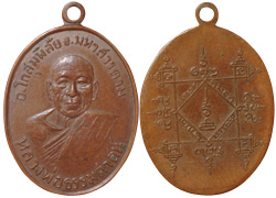 เหรียญหลวงพ่อธรรมศาสน์รุ่นแรก